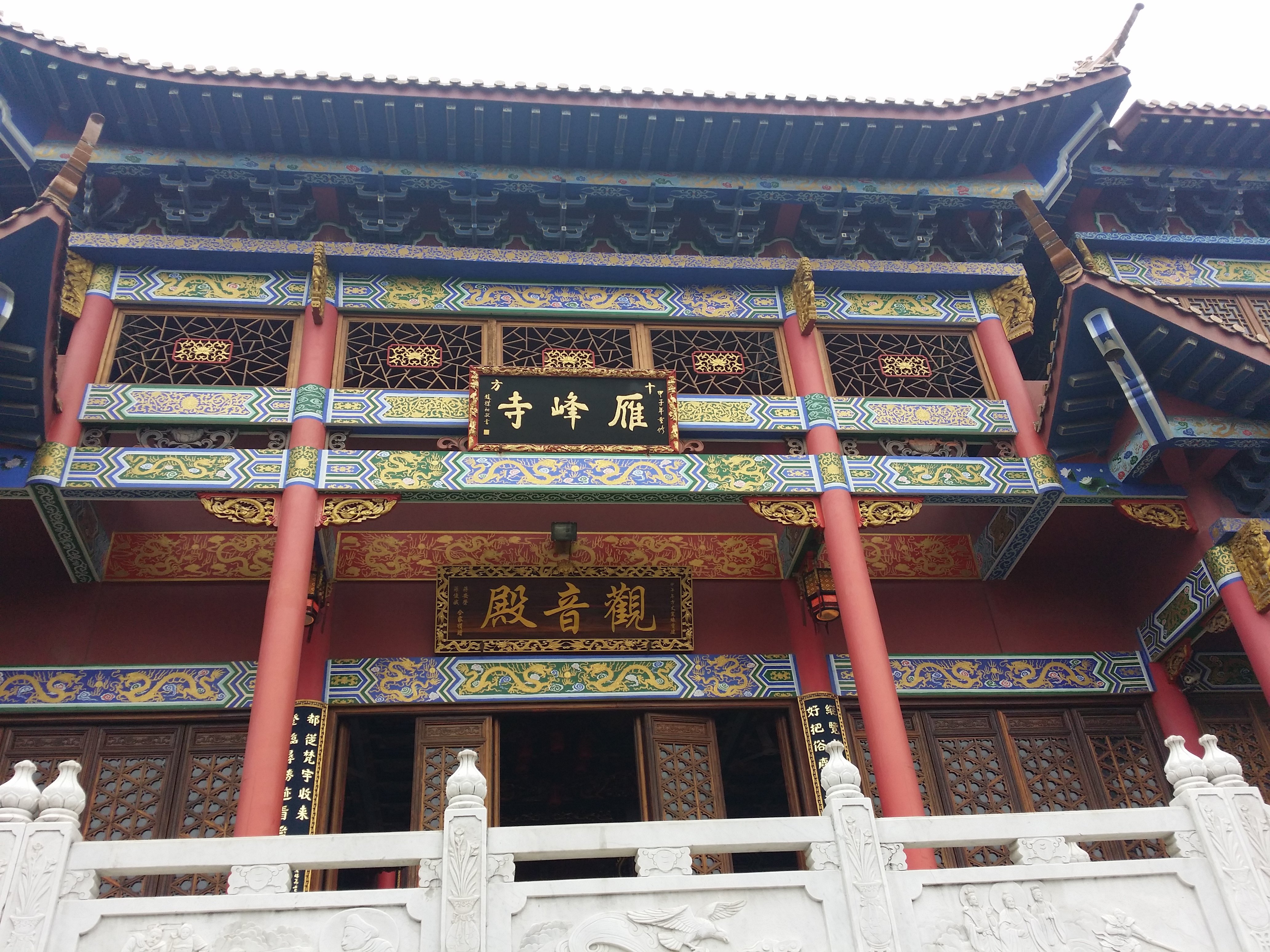 中文（中国大陆）: 雁峰寺的匾额